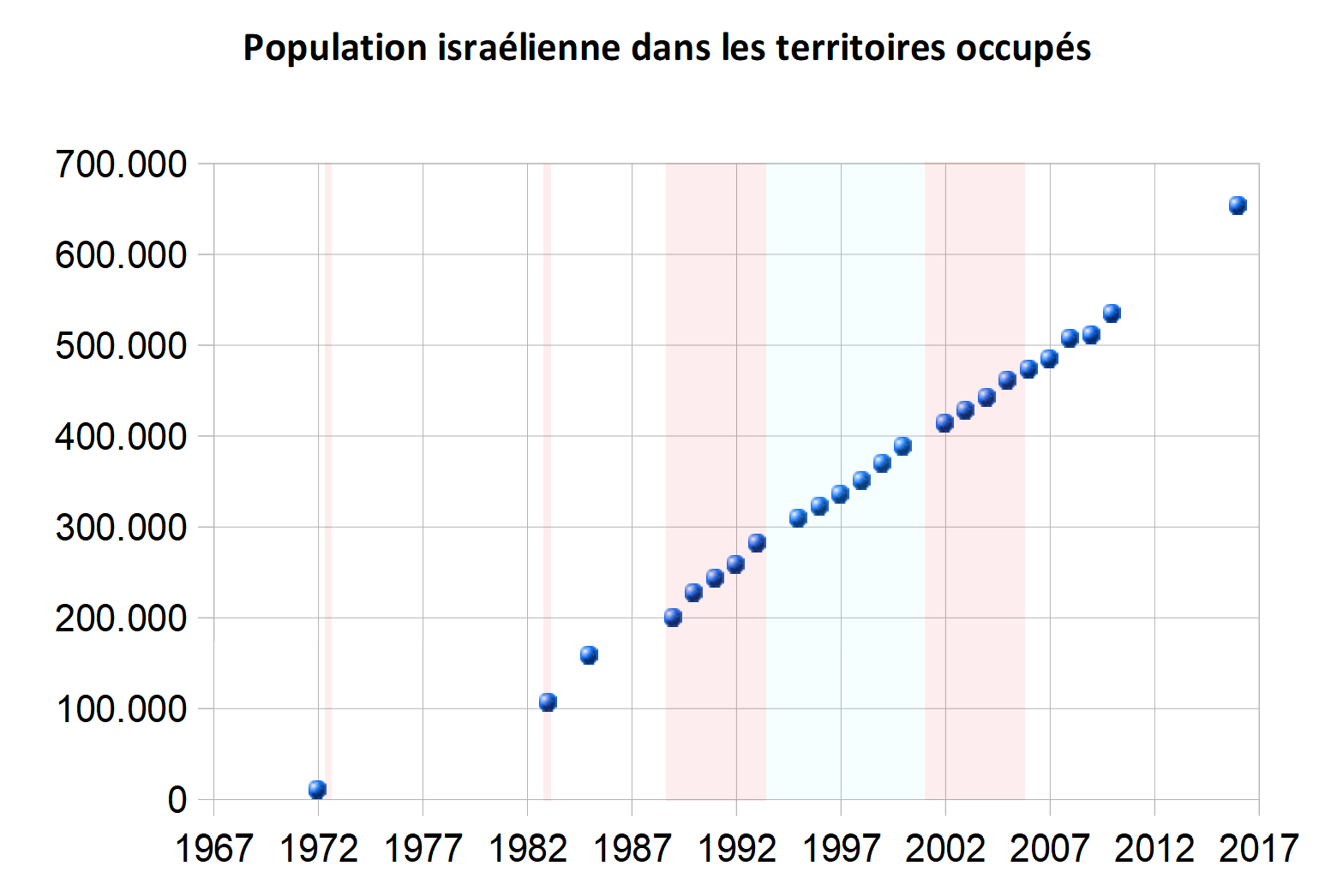 Les sources sont fournies au sein de cette version de l'article 'colonies israélienne' [1]